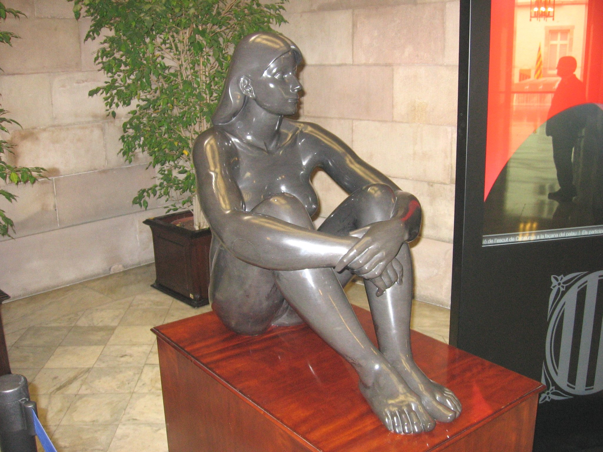 Figura femenina sentada cogiéndose de rodillas, de Joan Rebull i Torroja, Parlamento de Cataluña.